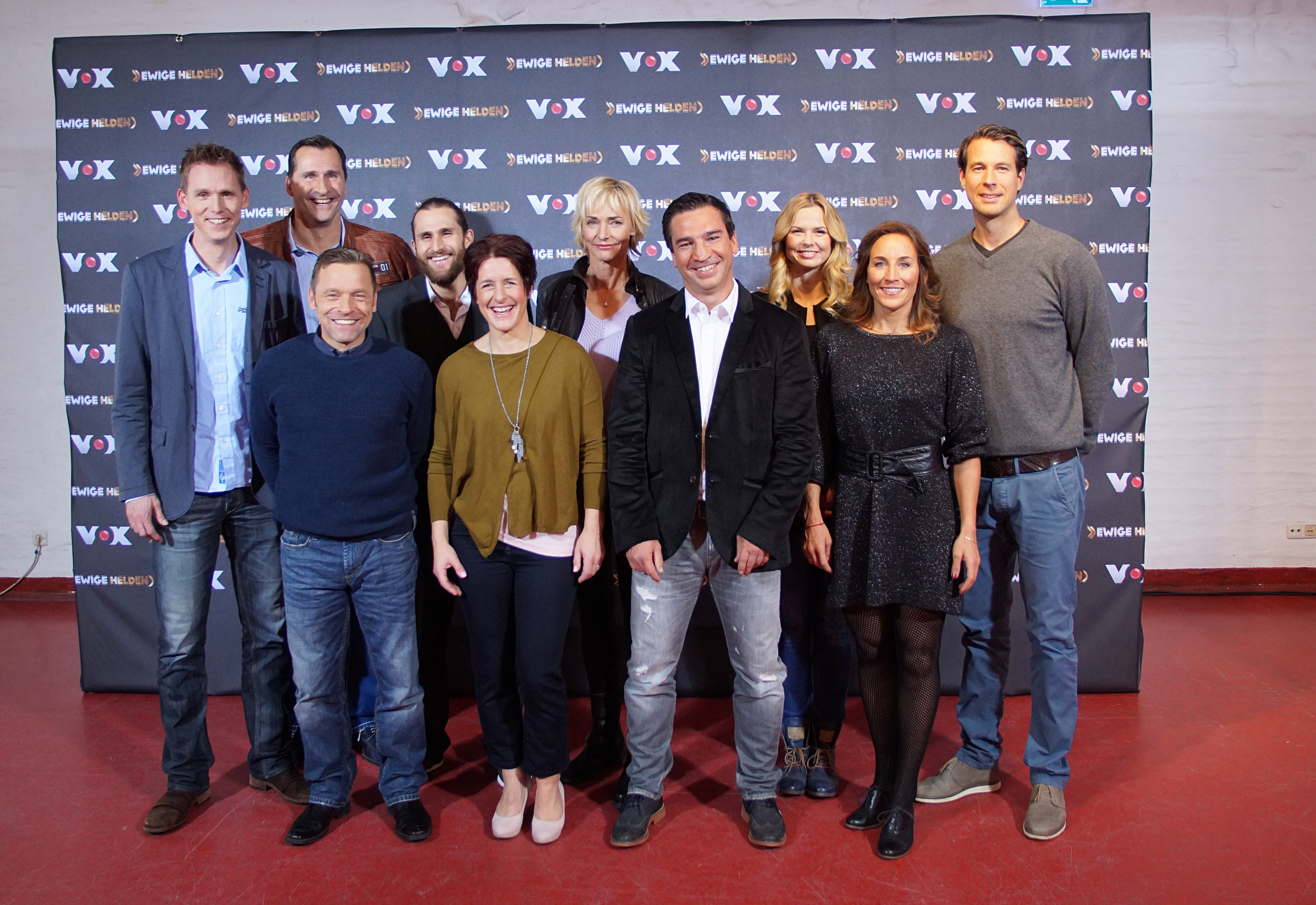 Frank Busemann, Lars Riedel, Thomas Häßler, Faris Al-Sultan, Uschi Disl, Heike Drechsler, Markus Beyer, Britta Steffen, Nicola Thost, Danny Ecker beim VOX "Ewige Helden" Pressetermin, im Dezember 2015 (links nach rechts).